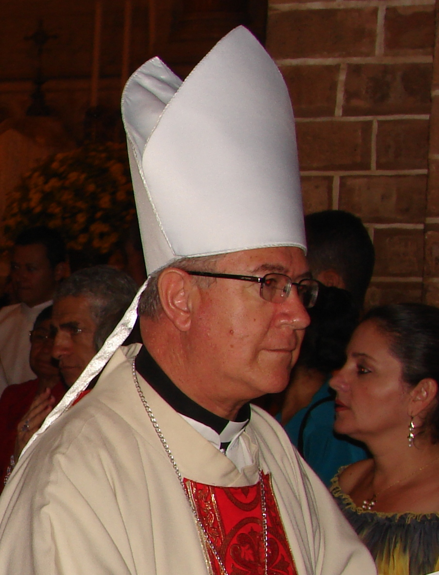 Monseñor Orlando Antonio Corrales García, Arzobispo de Santa Fe de Antioquia. Colombia